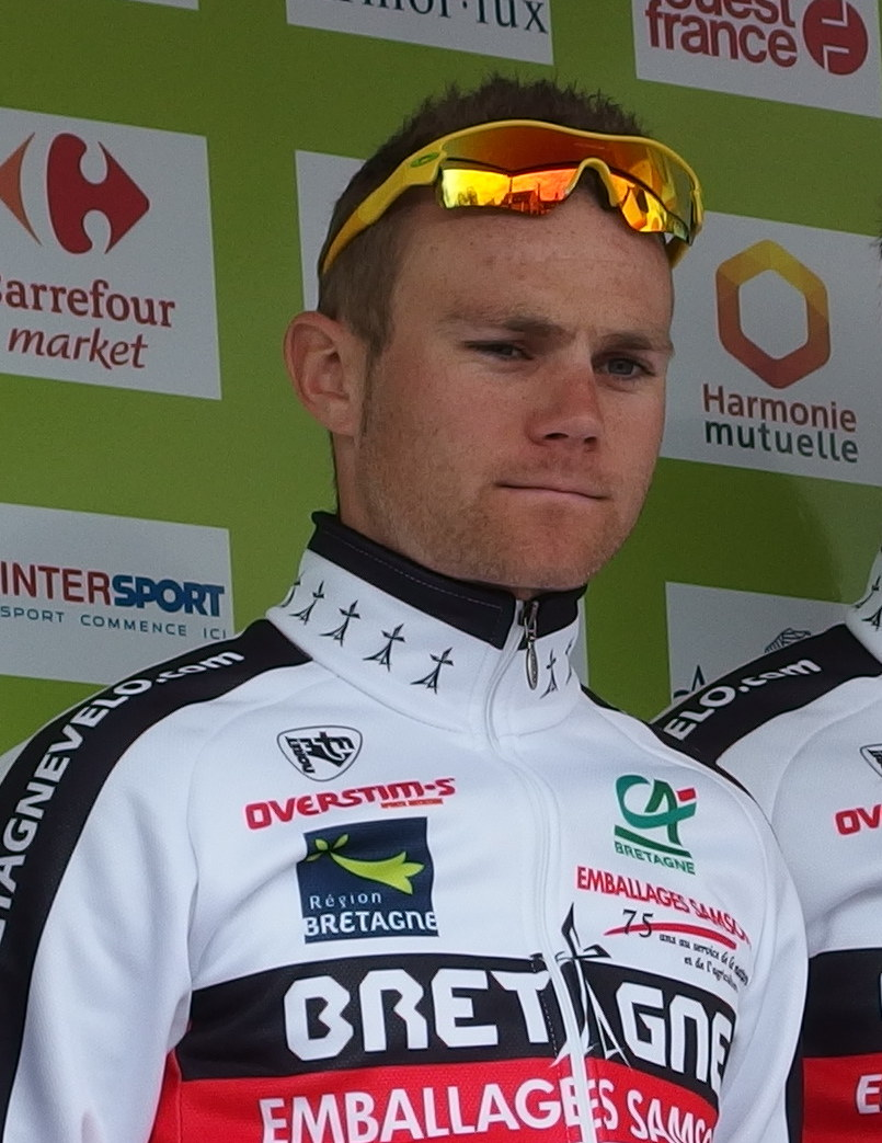 Tour de Bretagne 2014 - Présentation des équipes au départ de la sixième étape à Radenac - Équipe Sélection de Bretagne Depicted person: Maxime Cam